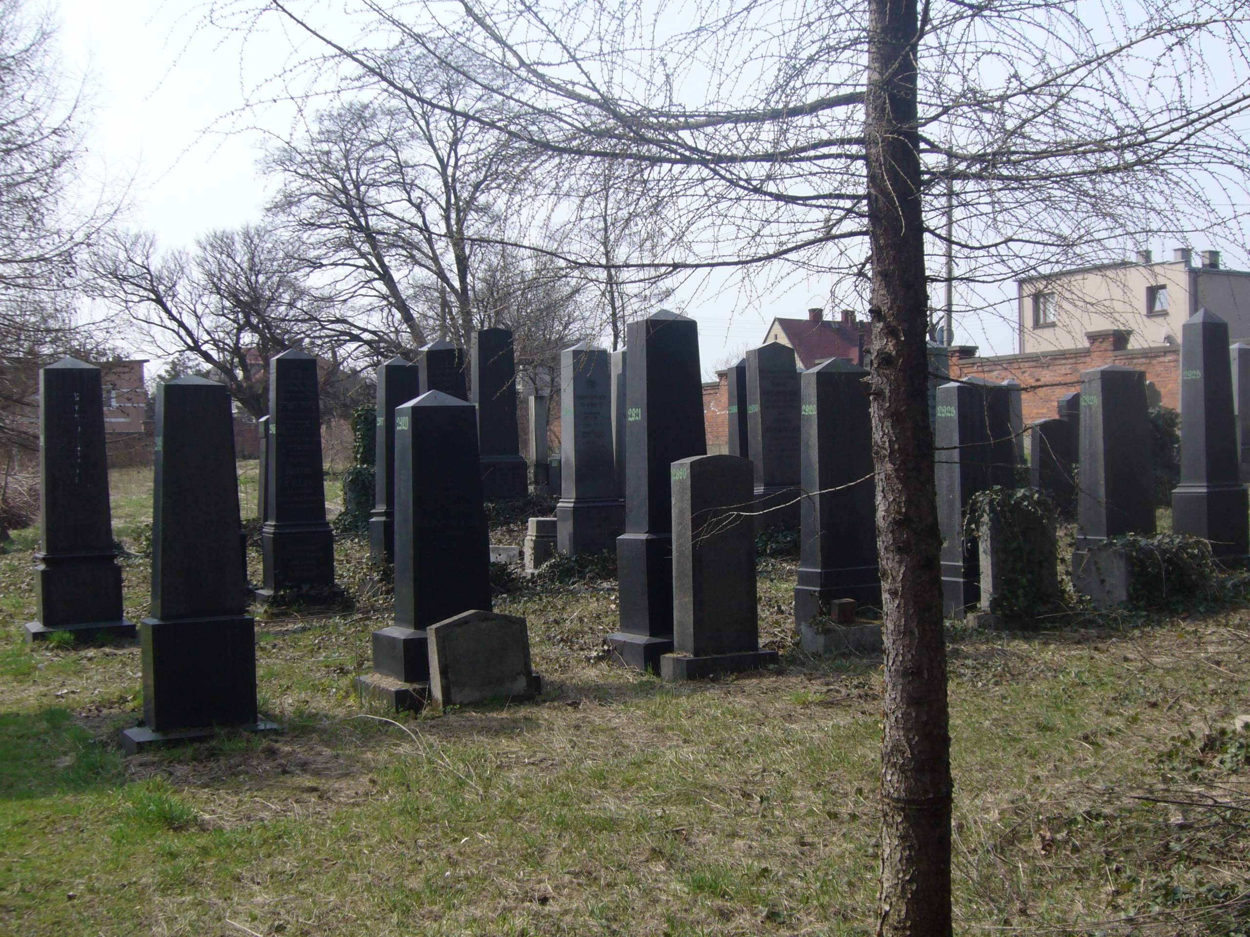 Widok ogólny na sektor G cmentarza żydowskiego w Bielsku-Białej.